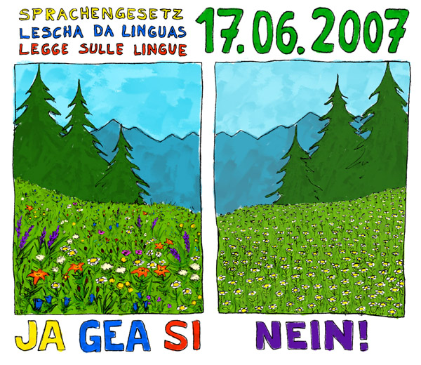 Rumantsch: Cartoon da Jon Bischoff (en collavuraziun cun GiuRu e PUNTS) per la lescha da linguas.